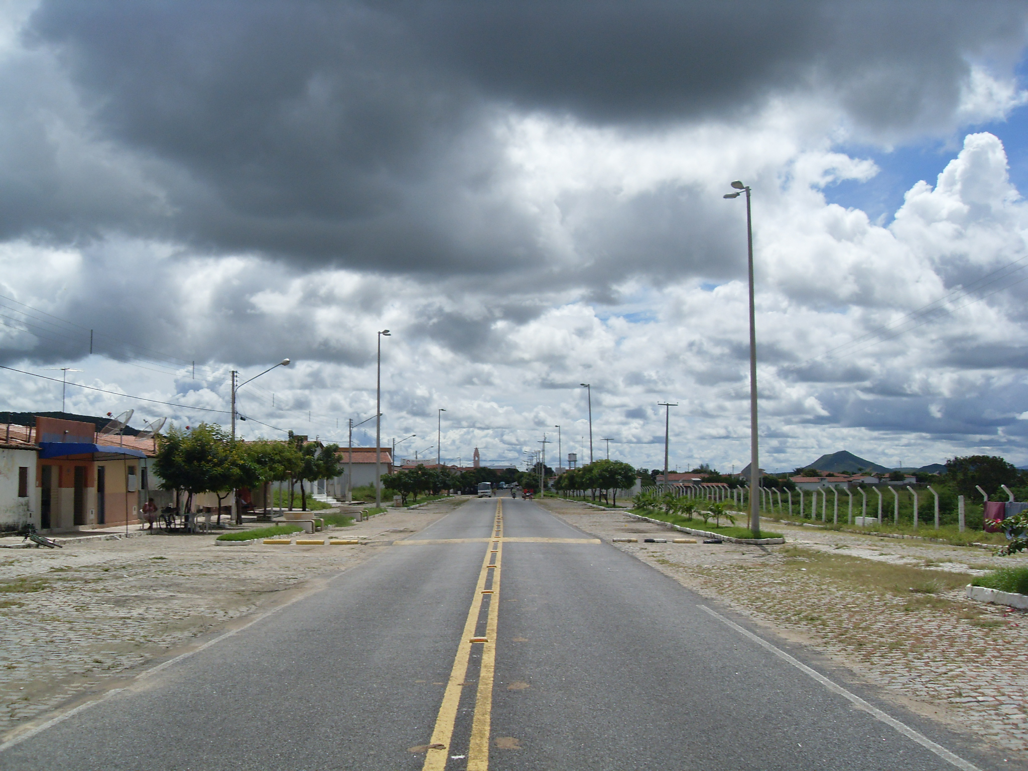 Estrada da Entrada